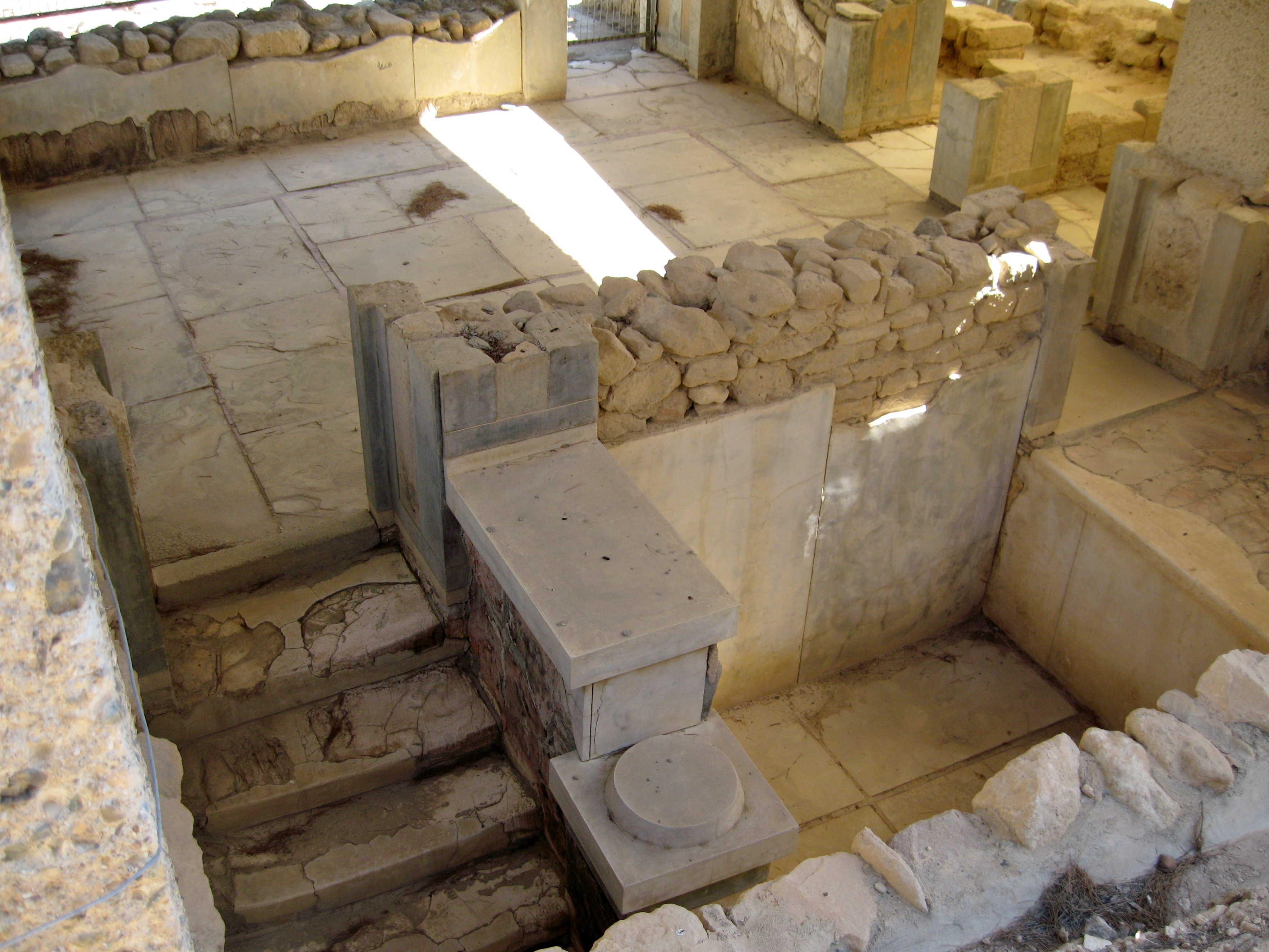 Kultbad im Palast von Phaistos, Kreta, Griechenland